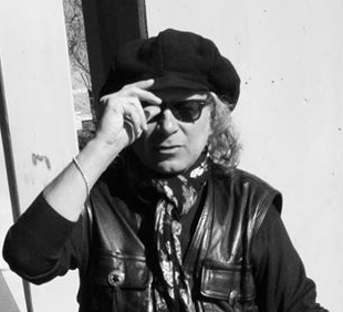 Claudio Centin, Cinquino, nel 2018